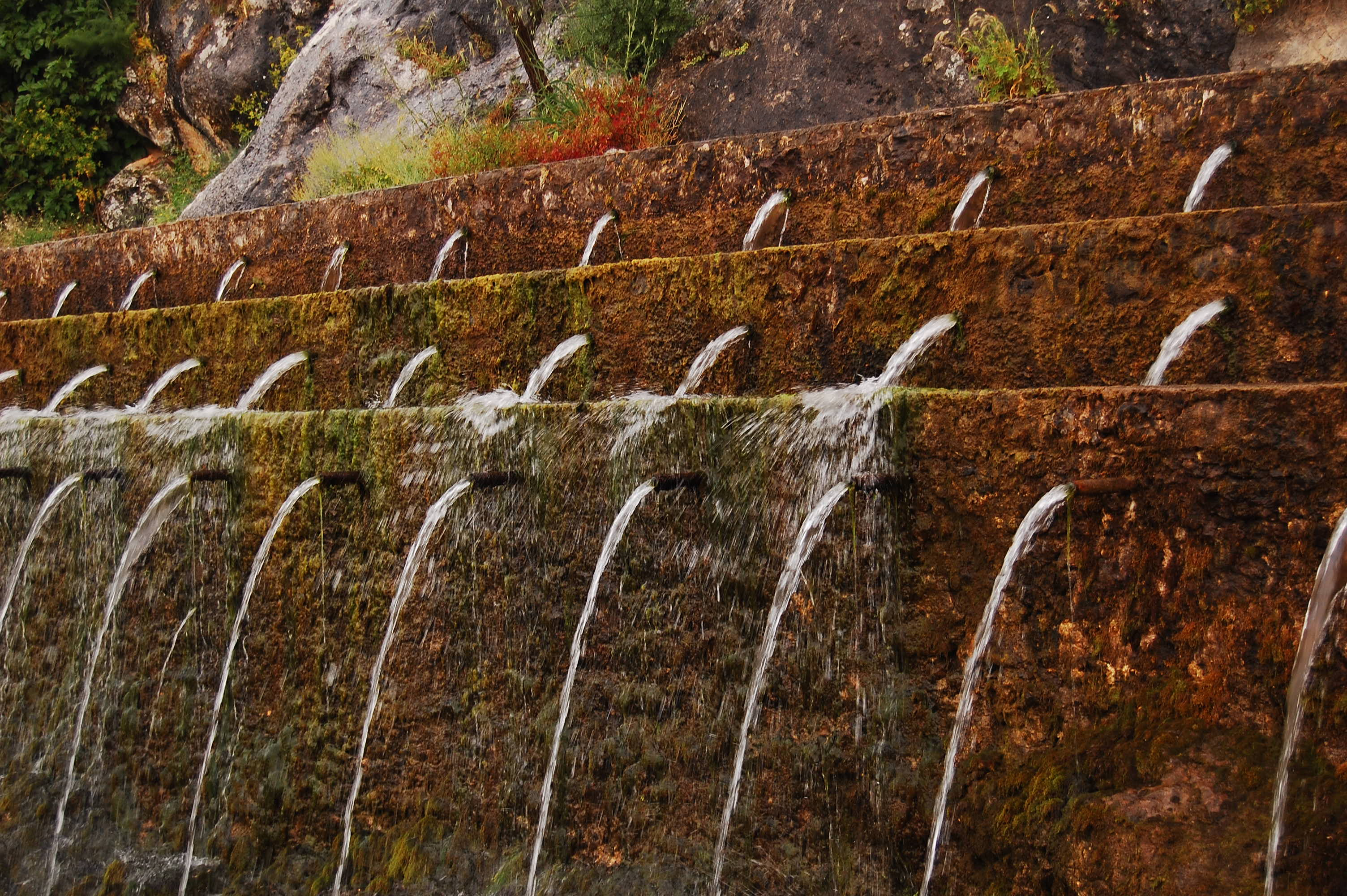 Fuente de los cien caños, Villanueva del Trabuco, Málaga, España.